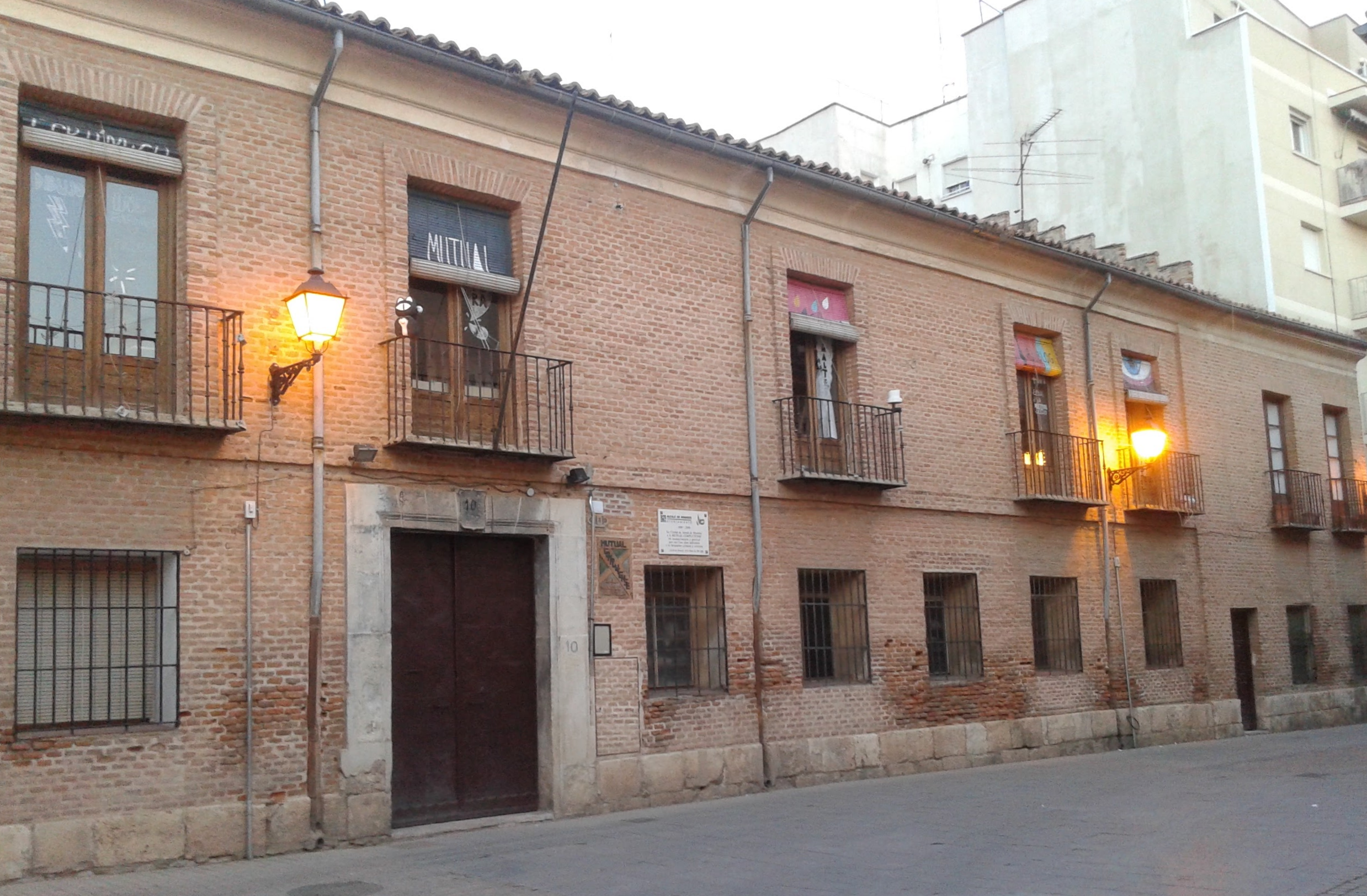 Fachada de la sede de la asociación cultural Mutual Complutense, ubicada en la calle Nueva, número 10, de Alcalá de Henares (Comunidad de Madrid - España).